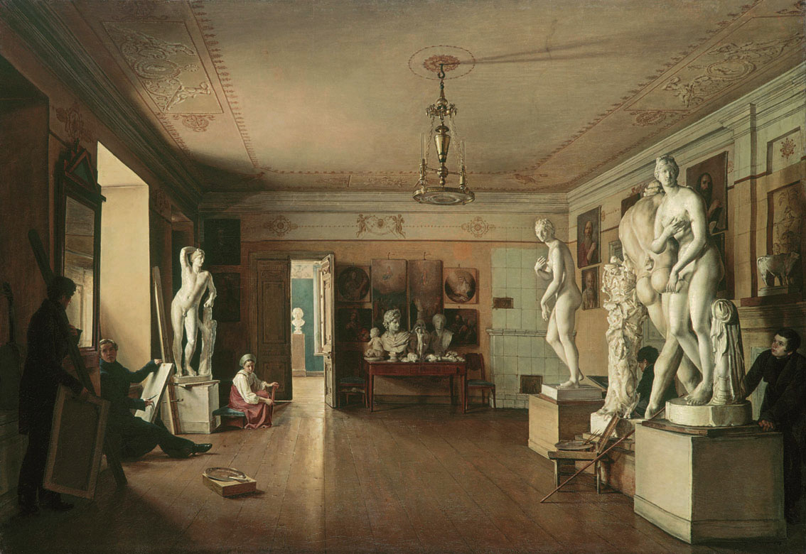 Мастерская художника А. Г. Венецианова в Петербурге 21. The Studio of the Artist Alexei Venetsianov in St Petersburg 1827 Холст, масло. 77 х 96 Вверху на подрамнике штамп: Г. Р. М. № 439 п. ф. (номер зачеркнут); ЖБ 603 ГРМ (зачеркнуто); справа внизу наклейка: 6 wei; справа синим карандашом: 4991 п. ф. (зачеркнуто) Поступила: в 1920-е; источник поступления неизвестен Ж-5212 За эту картину в 1827 Алексеев был признан достойным награждения золотой медалью 2-й степени, которую получил в 1829. В 1827 картина была приобретена П. П. Свиньиным для „Русского музеума"; как и остальная коллекция, очевидно, была им продана на аукционе в 1834. Рисунок „Мастерская Венецианова" 1827 - в Отделе рисунка ГРМ* (Р-12). Изображены автор, А. В. Тыранов и Н. С. Крылов.